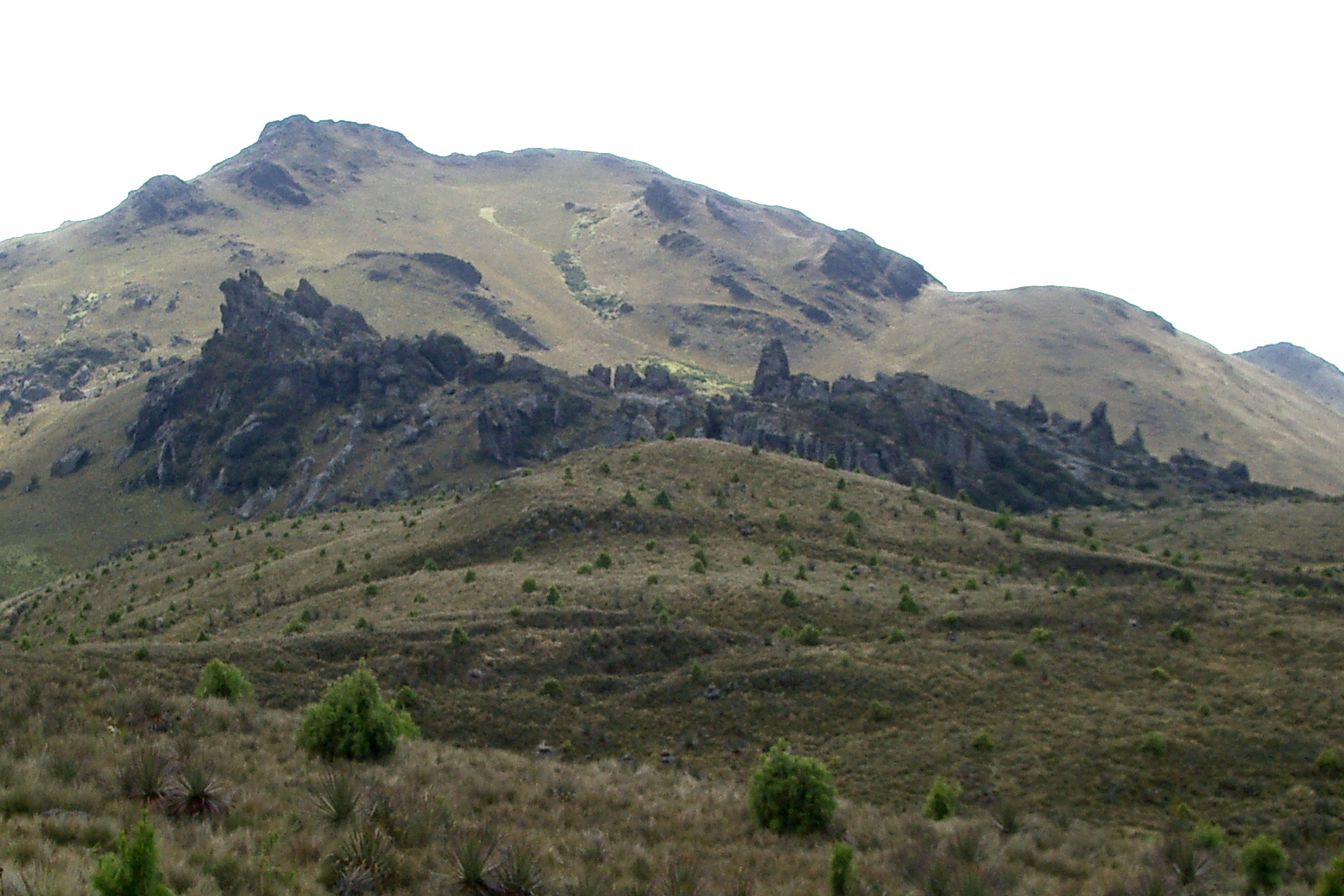 Cerro de Arcos, Ecuador